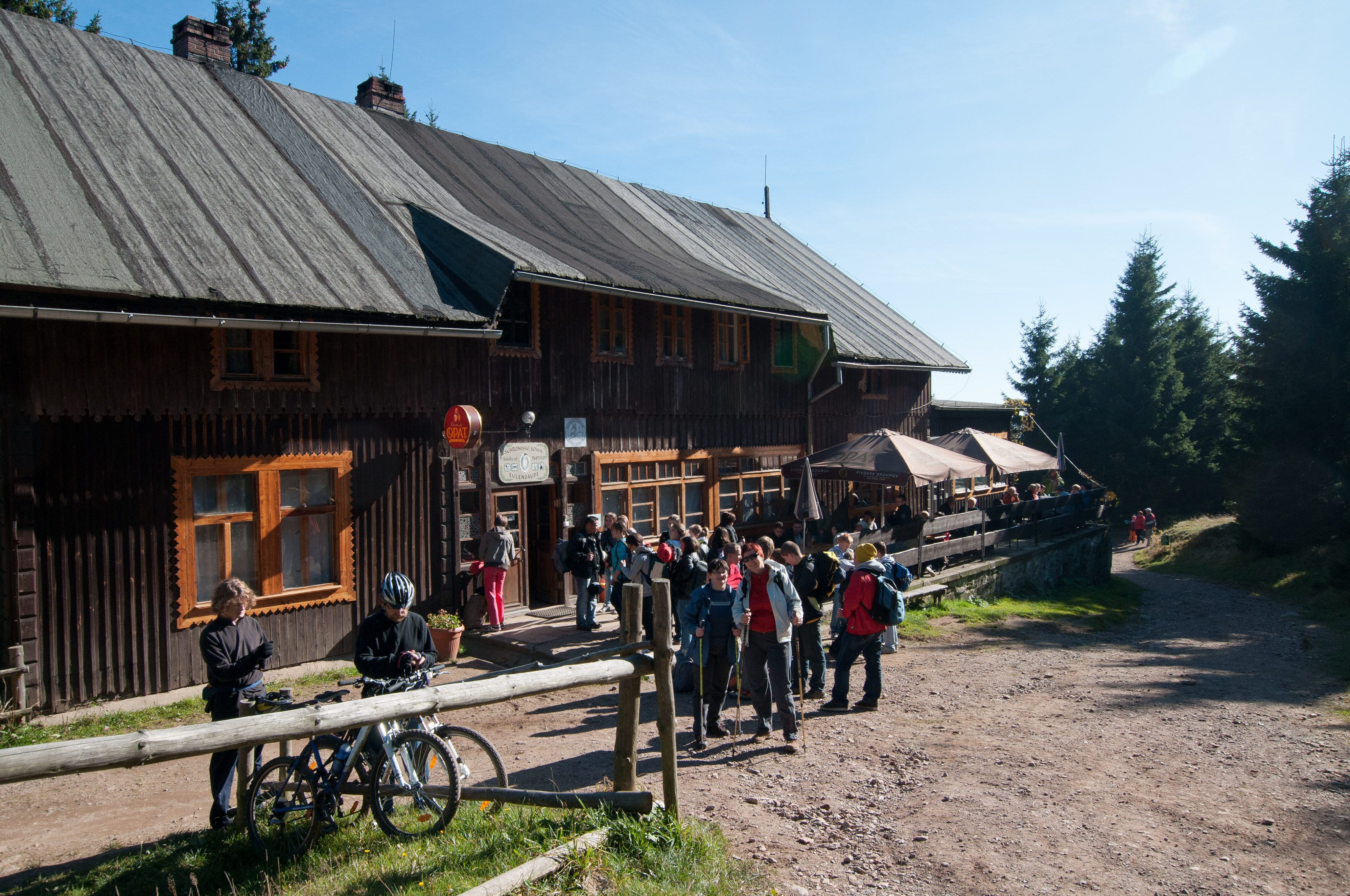 Schronisko górskie "Sowa".